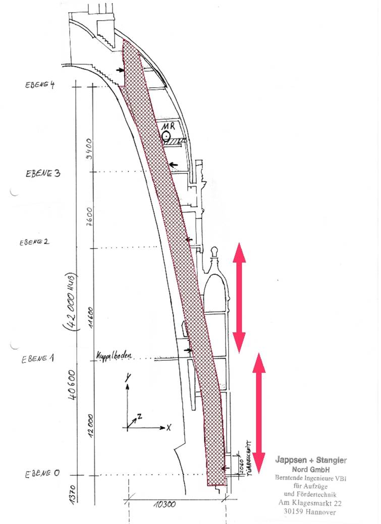 Ersteller: Hartmut Mackensen - Benutzer:Mackensen Objekt: Neues Rathaus Kuppelaufzug Daten